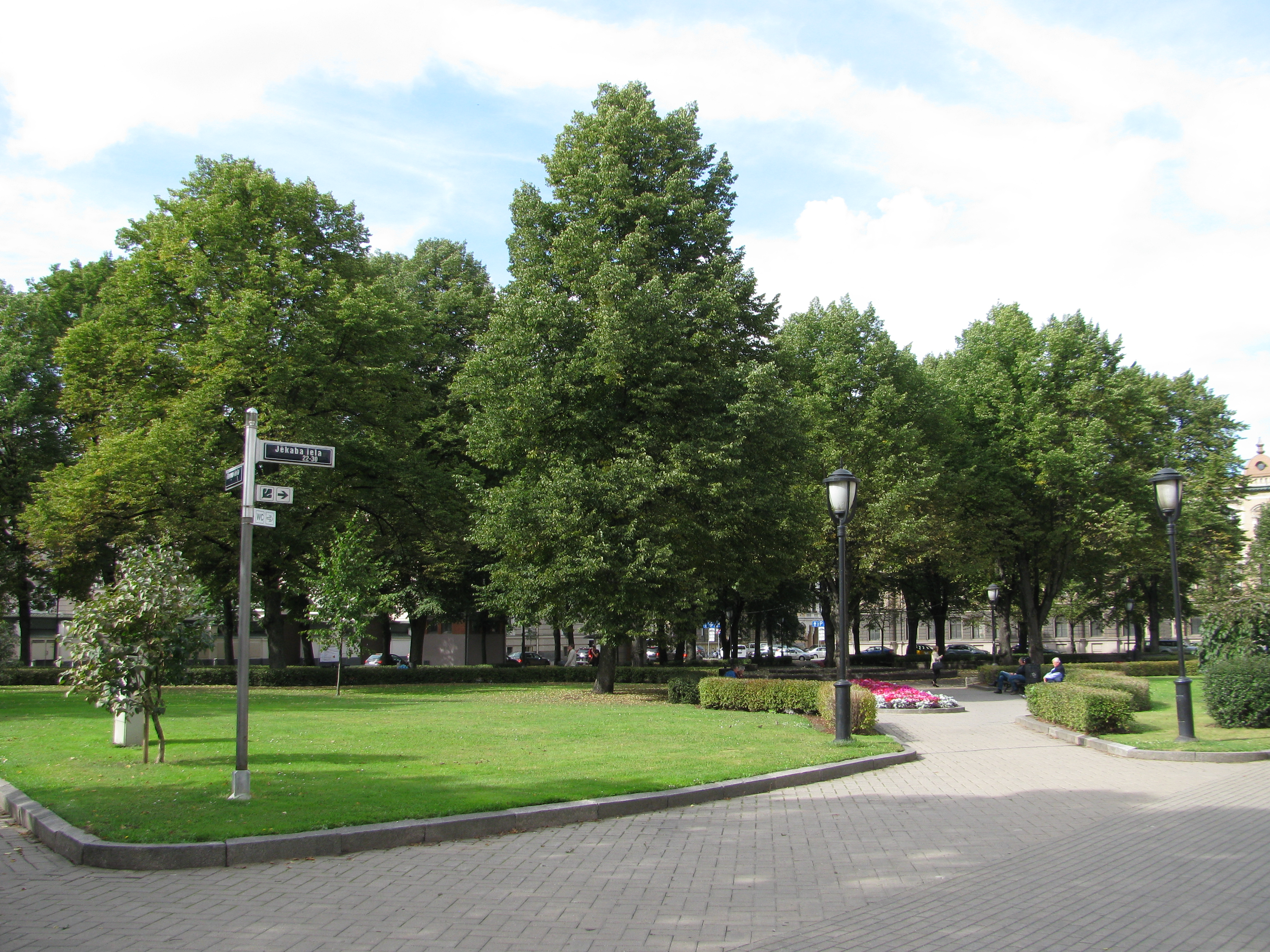 Rīga, Jēkaba laukums